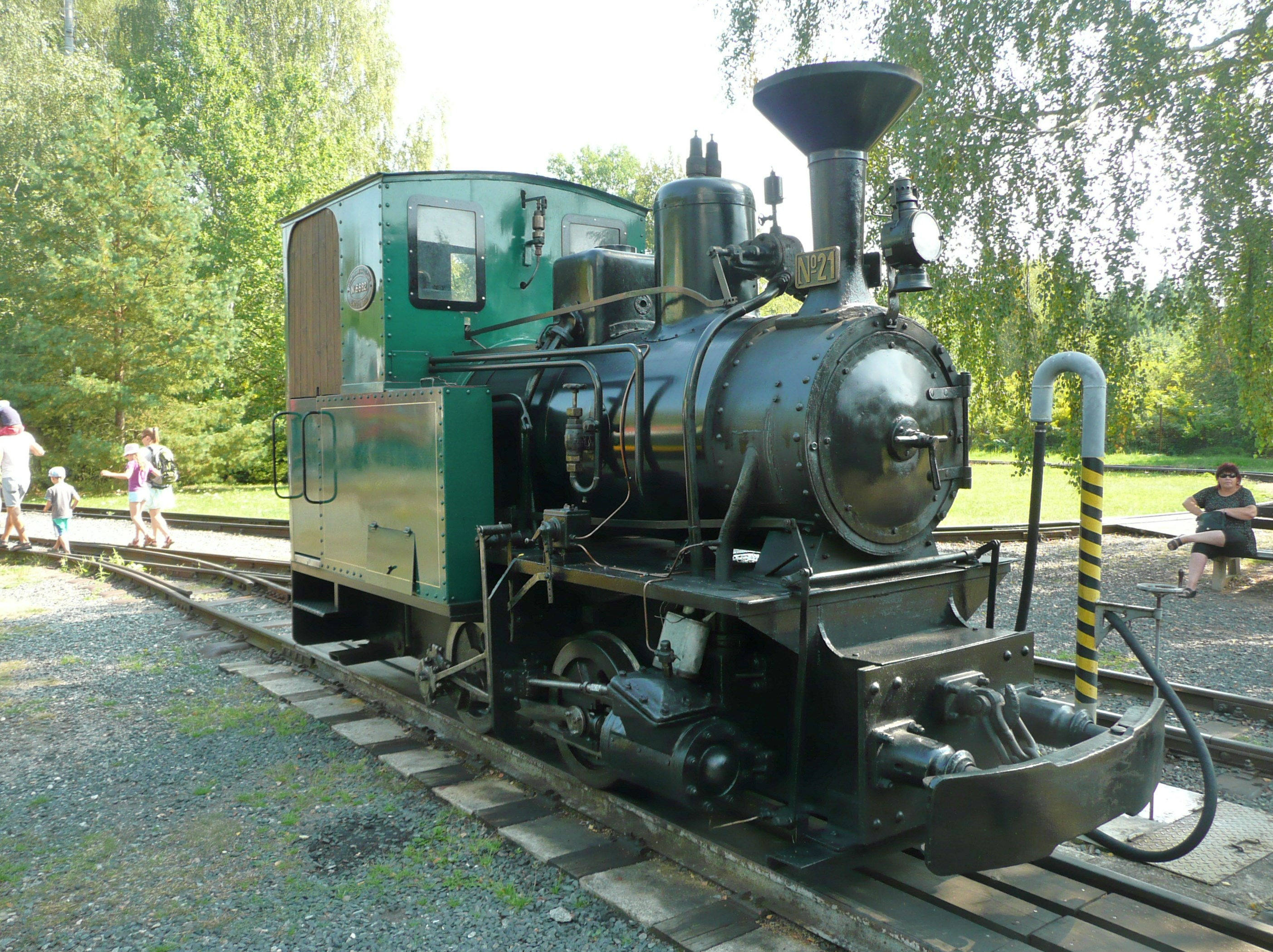 Schmalspurlokomotive Nr. 6682 von Krauss und Co im Eisenbahnmuseum Luzna